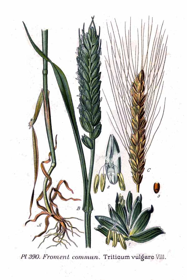 Triticum vulgare Vill.